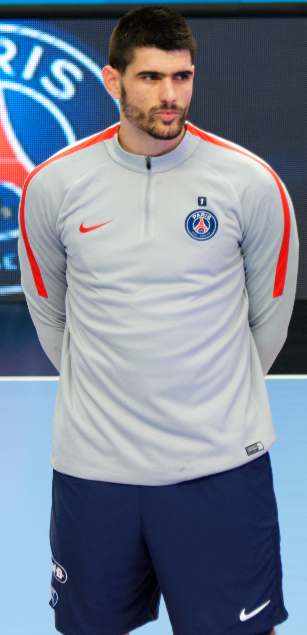 Match entre le PSG Handball et le Meshkov Brest. A Coubertin, le 24 septembre 2017.